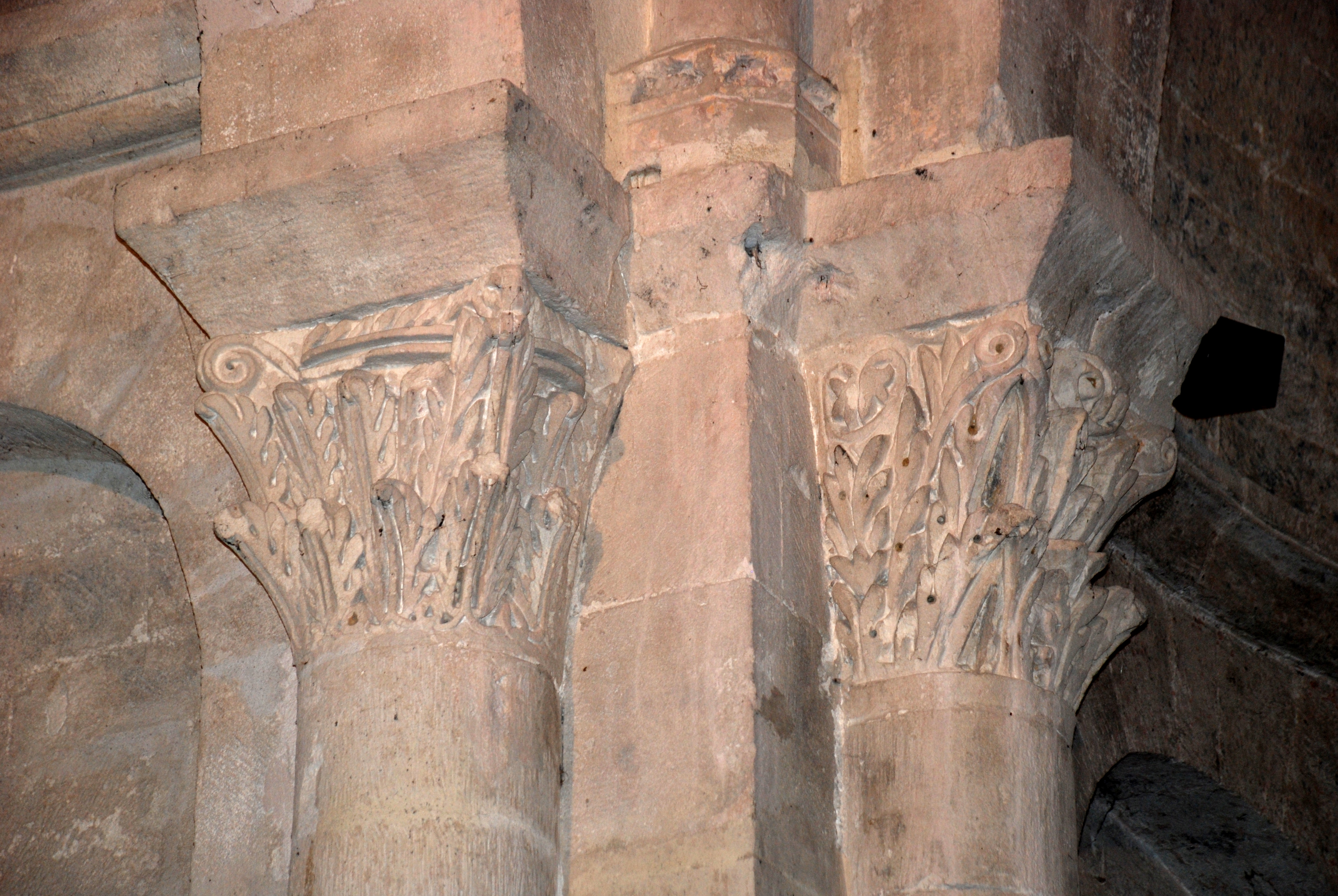 France - Drôme - Église Sainte-Croix de La Baume-de-Transit